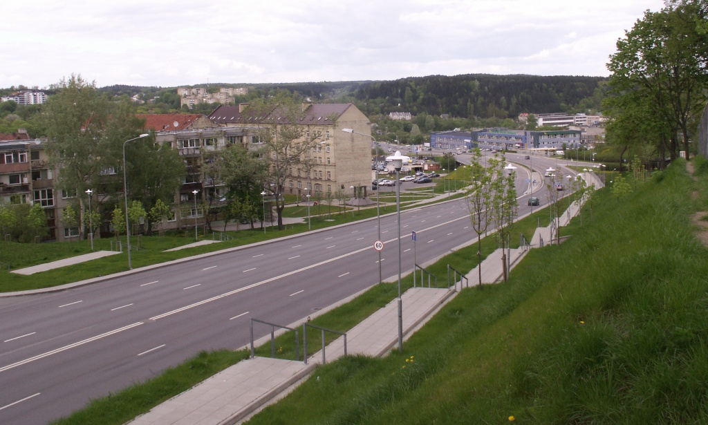 Vilniaus senamiesčio pietinis aplinkkelis